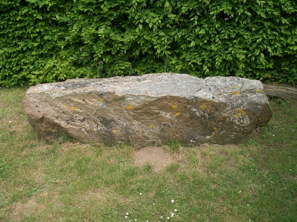 menhir découvert à Olendon (Calvados)